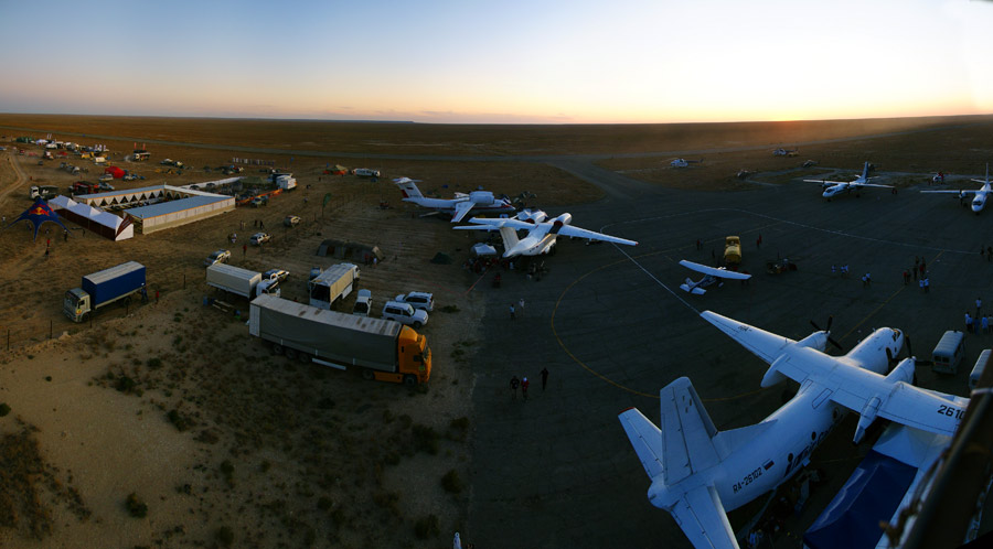 Панорама аэродрома Бейнеу, сделанная в ходе ралли Шелковый путь-2009.